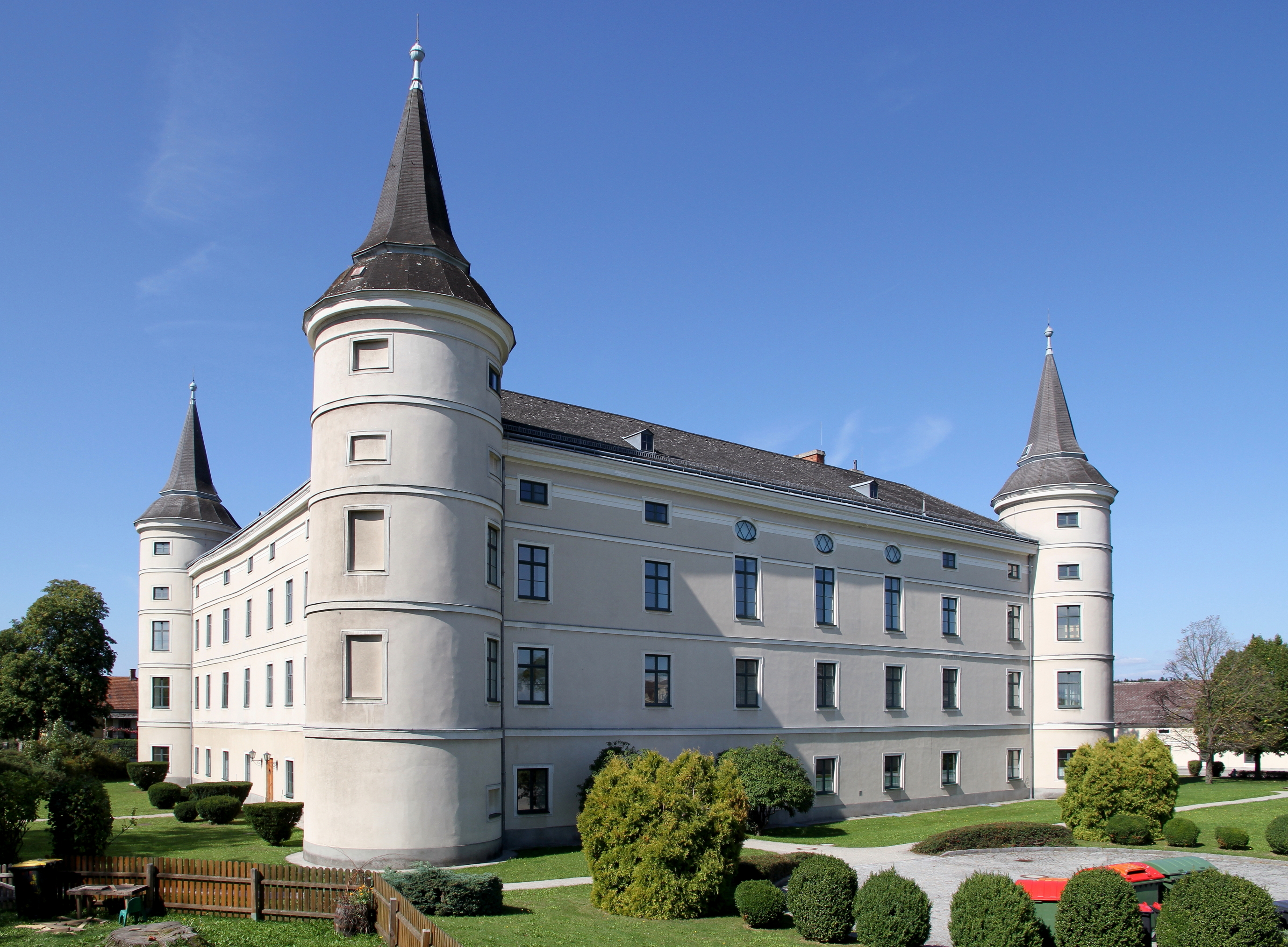 Südostansicht des niederösterreichischen Schlosses Wolfpassing. Das barocke Schloss ist eine viergeschoßige geschlossene Vierflügelanlage mit Arkadenhof und vorgestellten Ecktürmen, errichtet um 1690/1700.